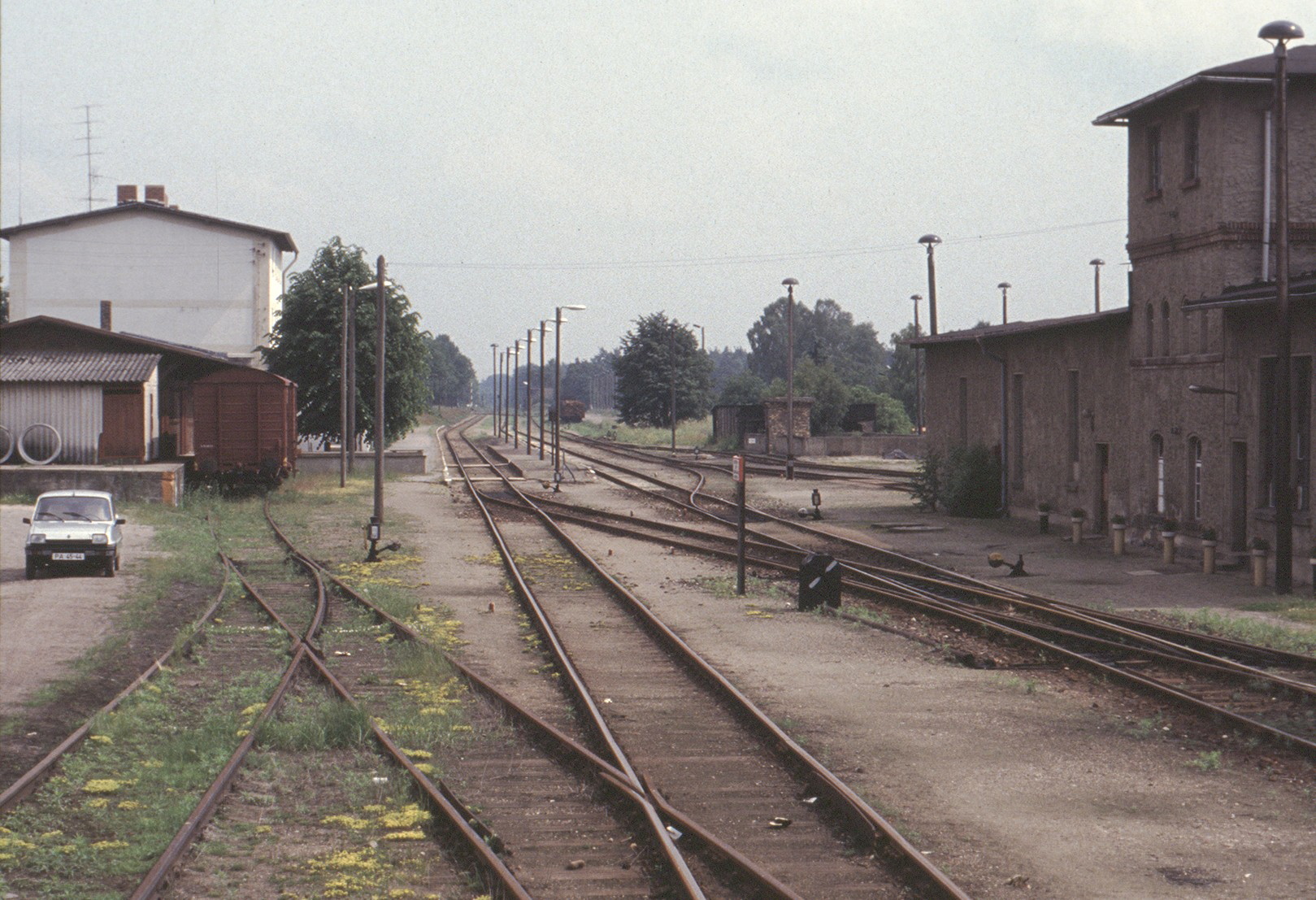 Bahnhof Rheinsberg (Mark)